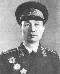 张爱萍上将1955年授衔照